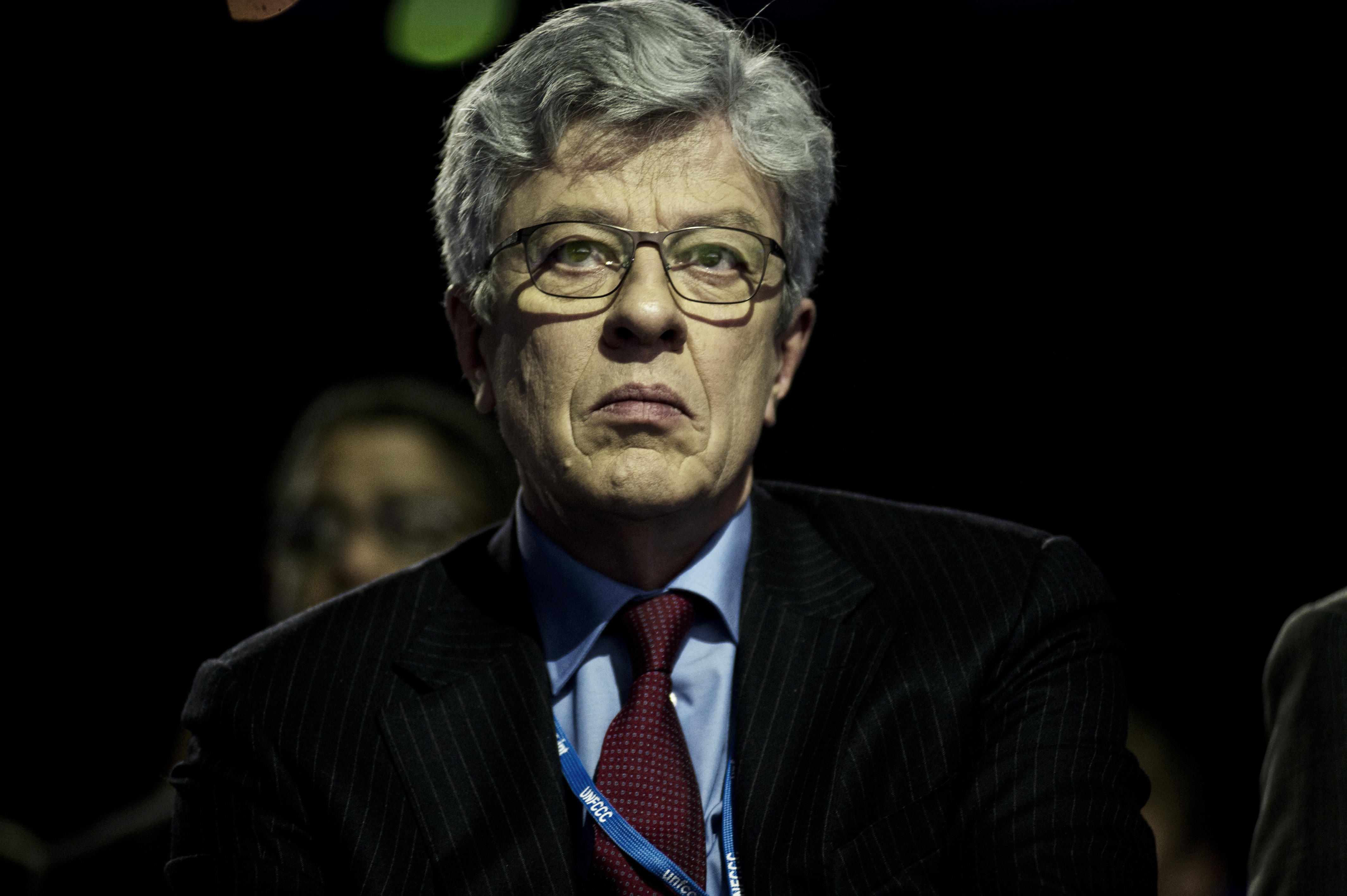 Michel M. Liès, directeur général et membre consultatif du groupe Swiss Re